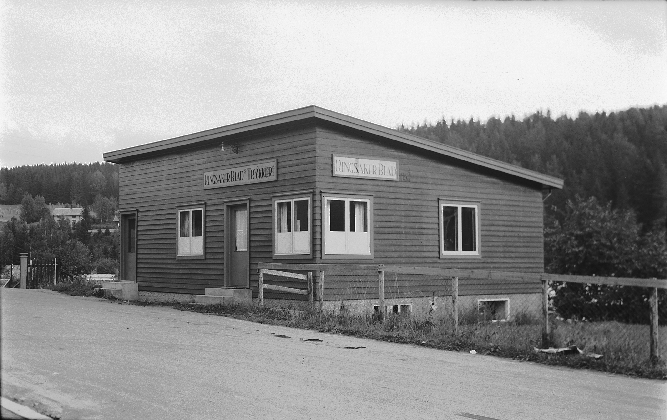 Ringsakers Blads trykkeri, sannsynligvis en gang mellom 1940 og 1955